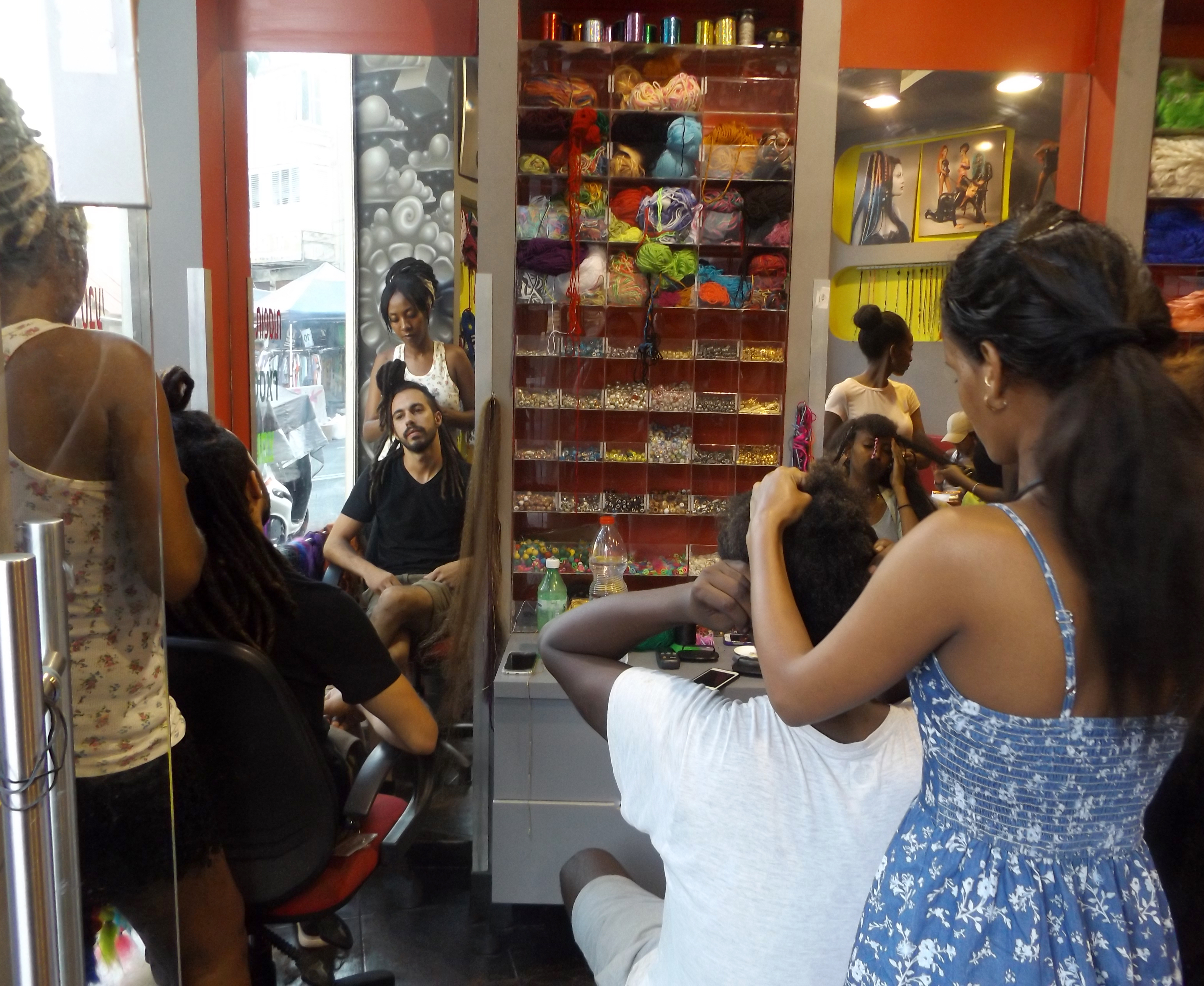 אוראל המאוי תיכון רוטברג קינג גורג 44 תל אביב